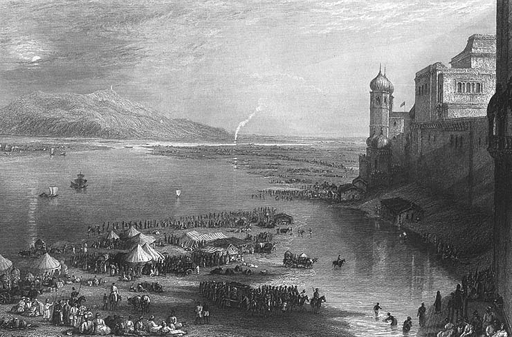 Haridwar Kumbh Mela - 1850s. Steel engraving